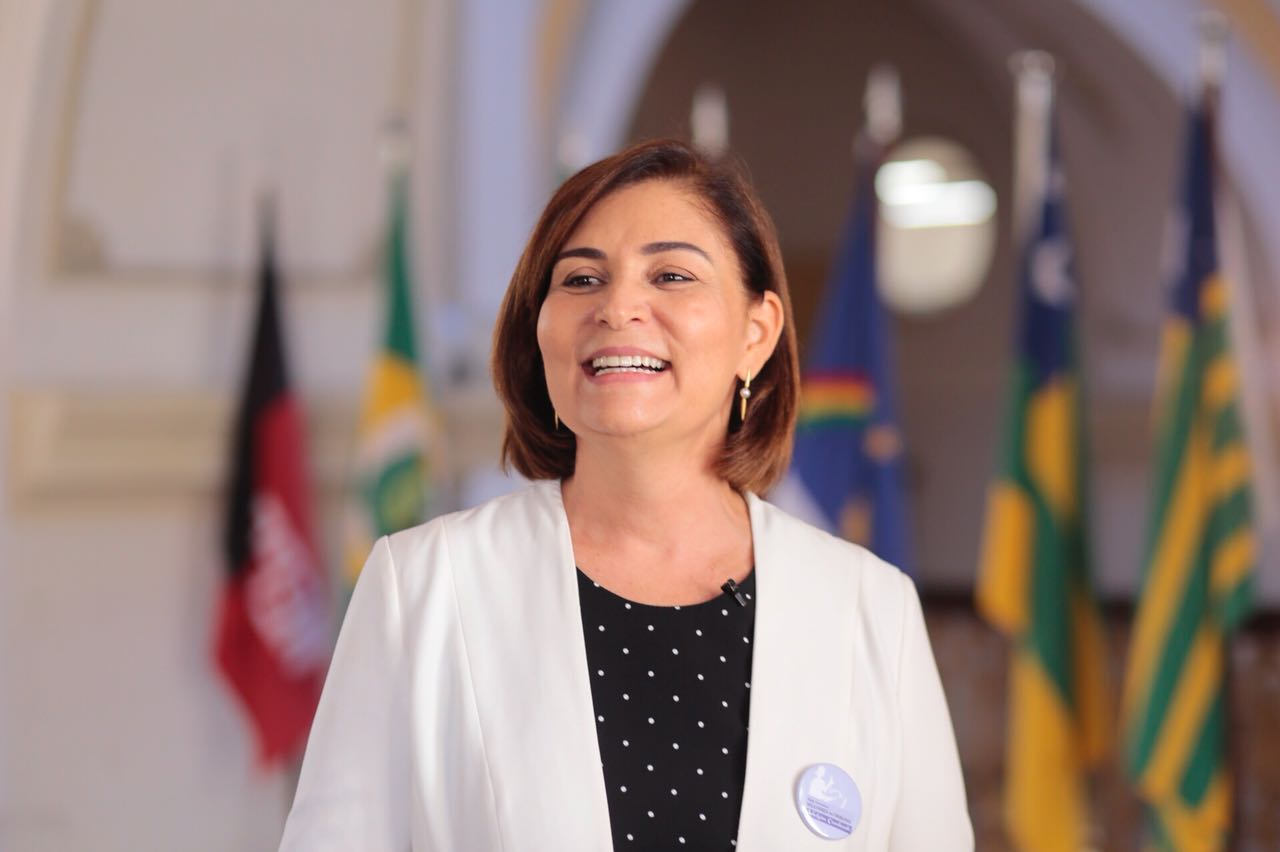 Simone Santana no lançamento da ação formativa Mulheres na Tribuna, em 2018. Foto: Hércio Moraes